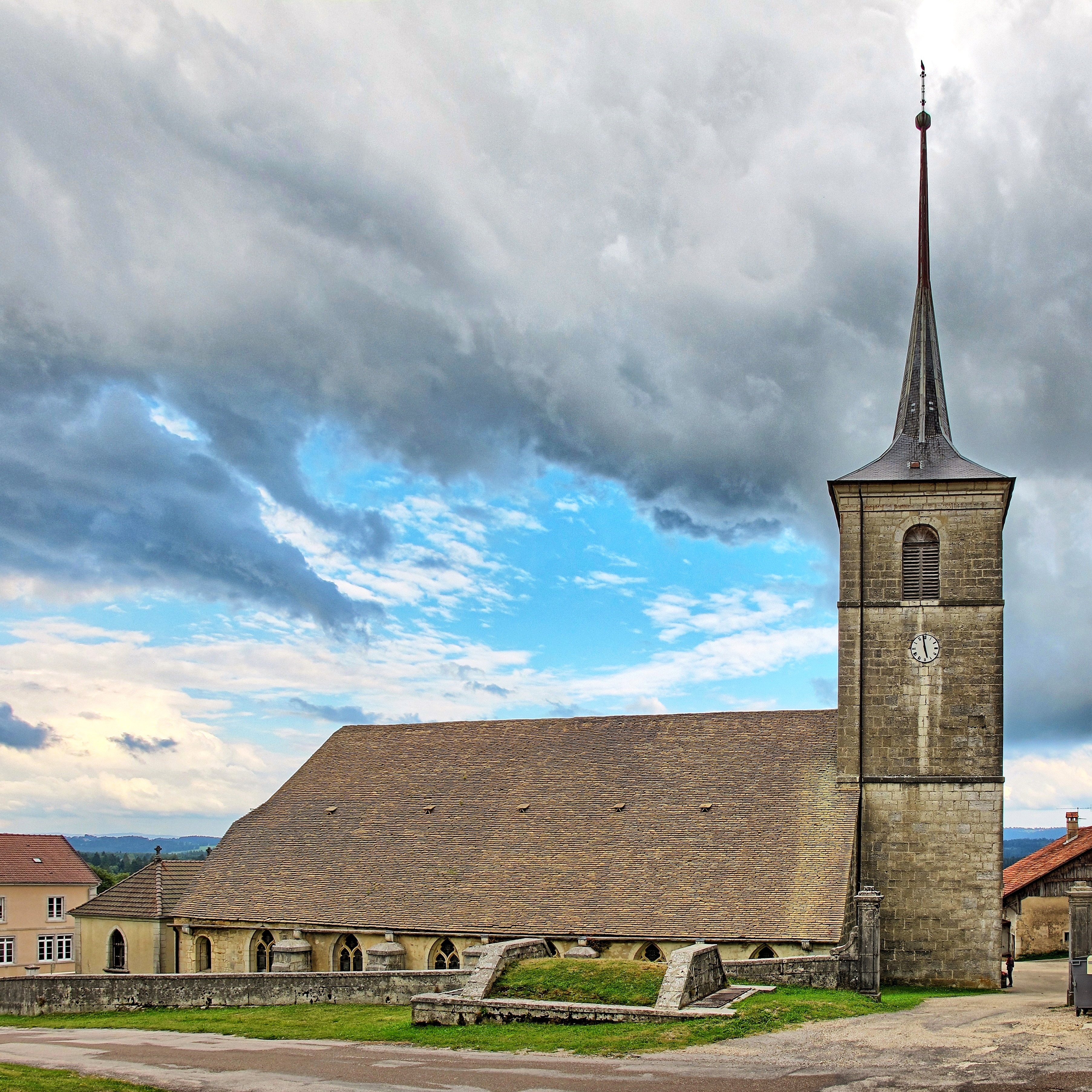 Inscrit aux monuments historiques sous le numéro PA00101616